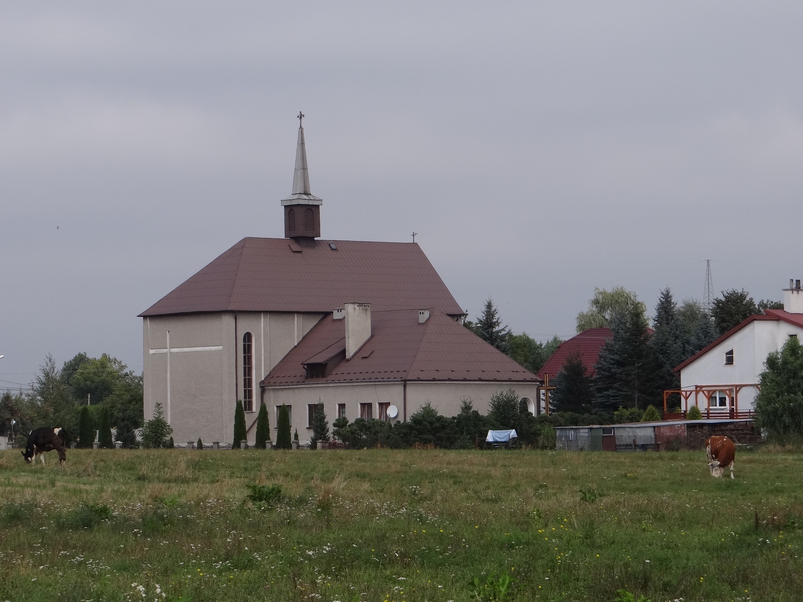 Siedlec